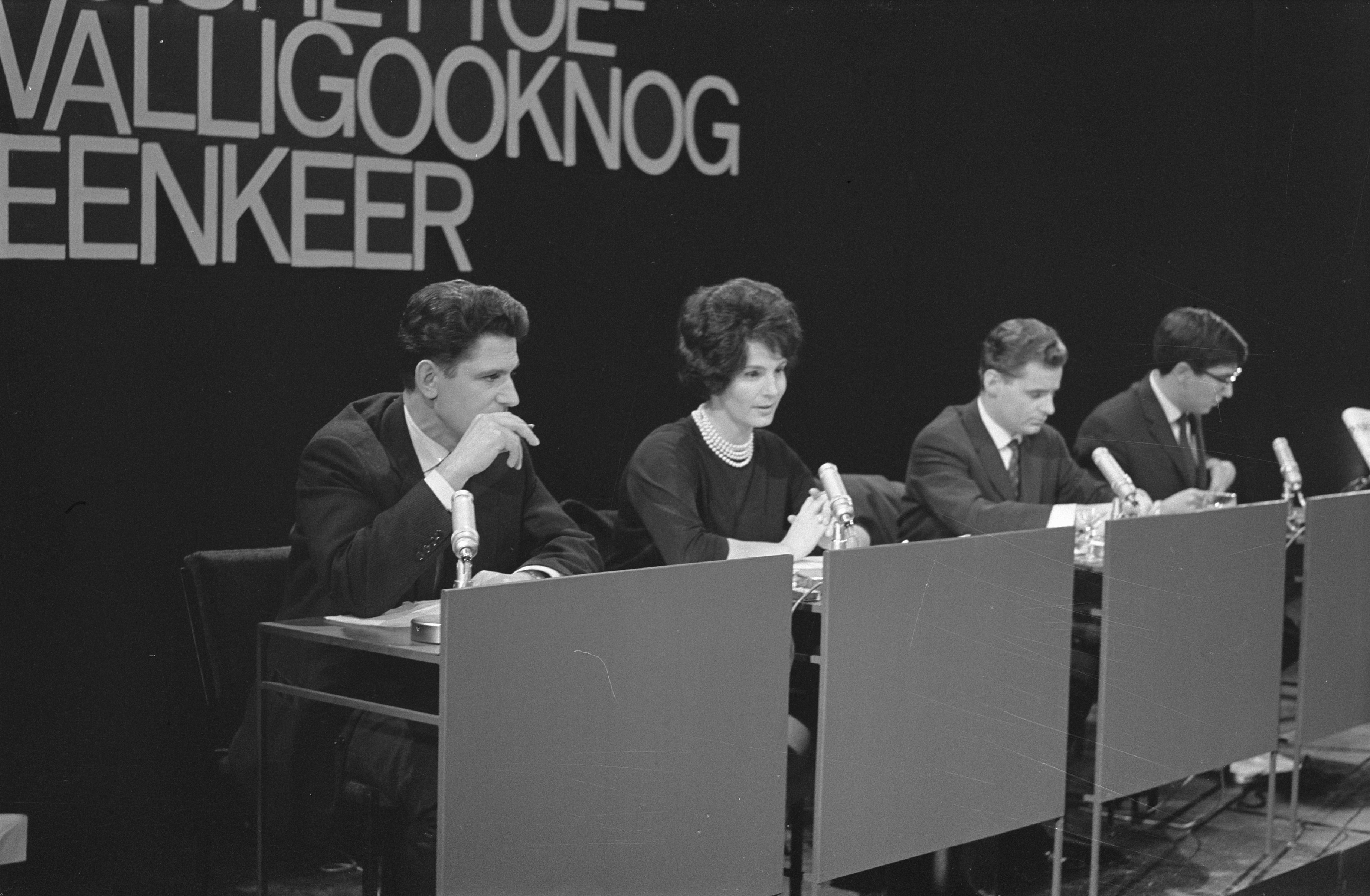 Collectie / Archief : Fotocollectie Anefo Reportage / Serie : [ onbekend ] Beschrijving : Programma "Zo is het toevallig ook nog een keer" van de VARA. De medewerkenden Dimitri Frenkel Frank, Mies Bouwman, Rinus Ferdinandusse en Joop van Tijn Datum : 7 december 1963 Trefwoorden : TV-programmas, medewerkers Persoonsnaam : Bouwman, Mies, Ferdinandusse, Rinus, Frenkel Frank, Dimitri, Tijn, Joop van Fotograaf : Bilsen, Joop van / Anefo Auteursrechthebbende : Nationaal Archief Materiaalsoort : Negatief (zwart/wit) Nummer archiefinventaris : bekijk toegang 2.24.01.05 Bestanddeelnummer : 915-8180